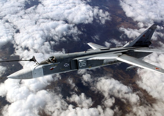 Un Su-24M de l'aéronavale de la flotte russe de la Baltique en ravitaillement en vol en 2015.